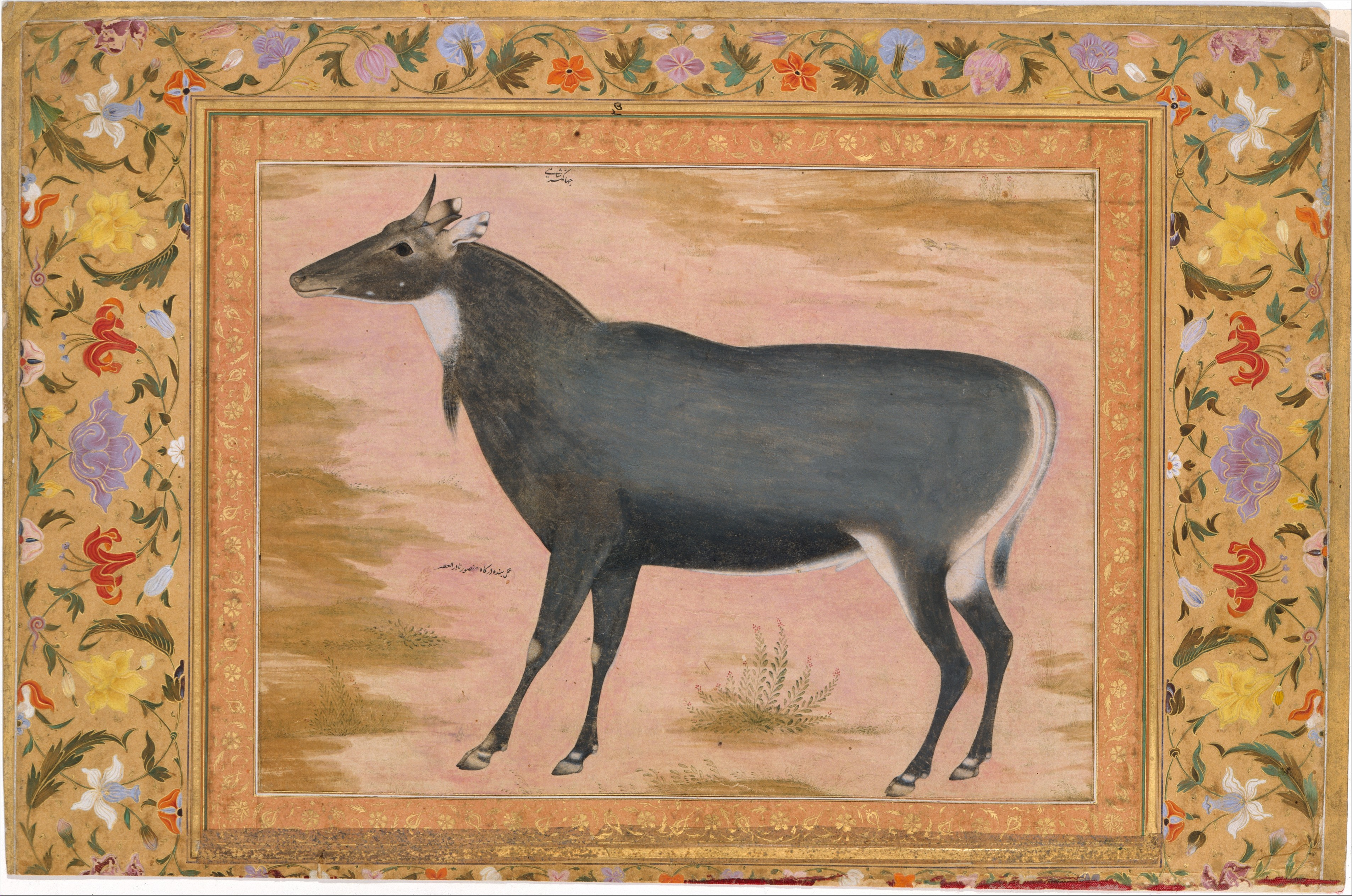 Album leaf; Codices